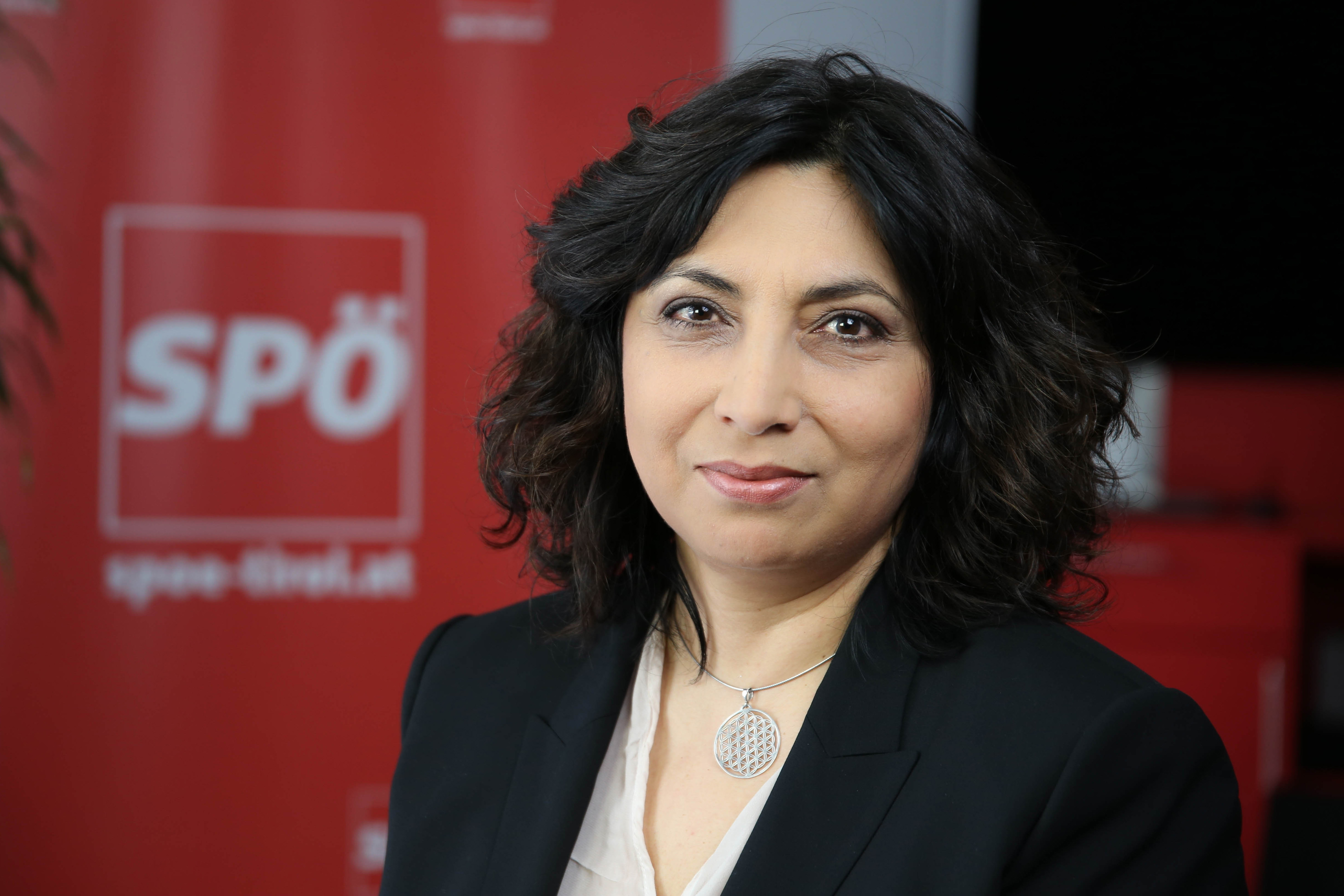 Selma Yildirim (c) jh IMG_9655-1